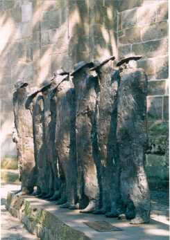 Beeld van Poaskearls te Ootmarsum; foto door Fruggo, zomer 2003